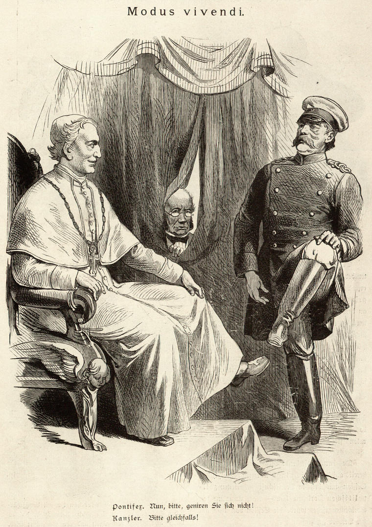 Karikatur „Modus vivendi“ aus dem Kladderadatsch, 1878, zu Leo XIII. und Bismarck. Die Bildunterschrift lautet: Pontifex. Nun bitte, genieren Sie sich nicht! Kanzler. Bitte gleichfalls!